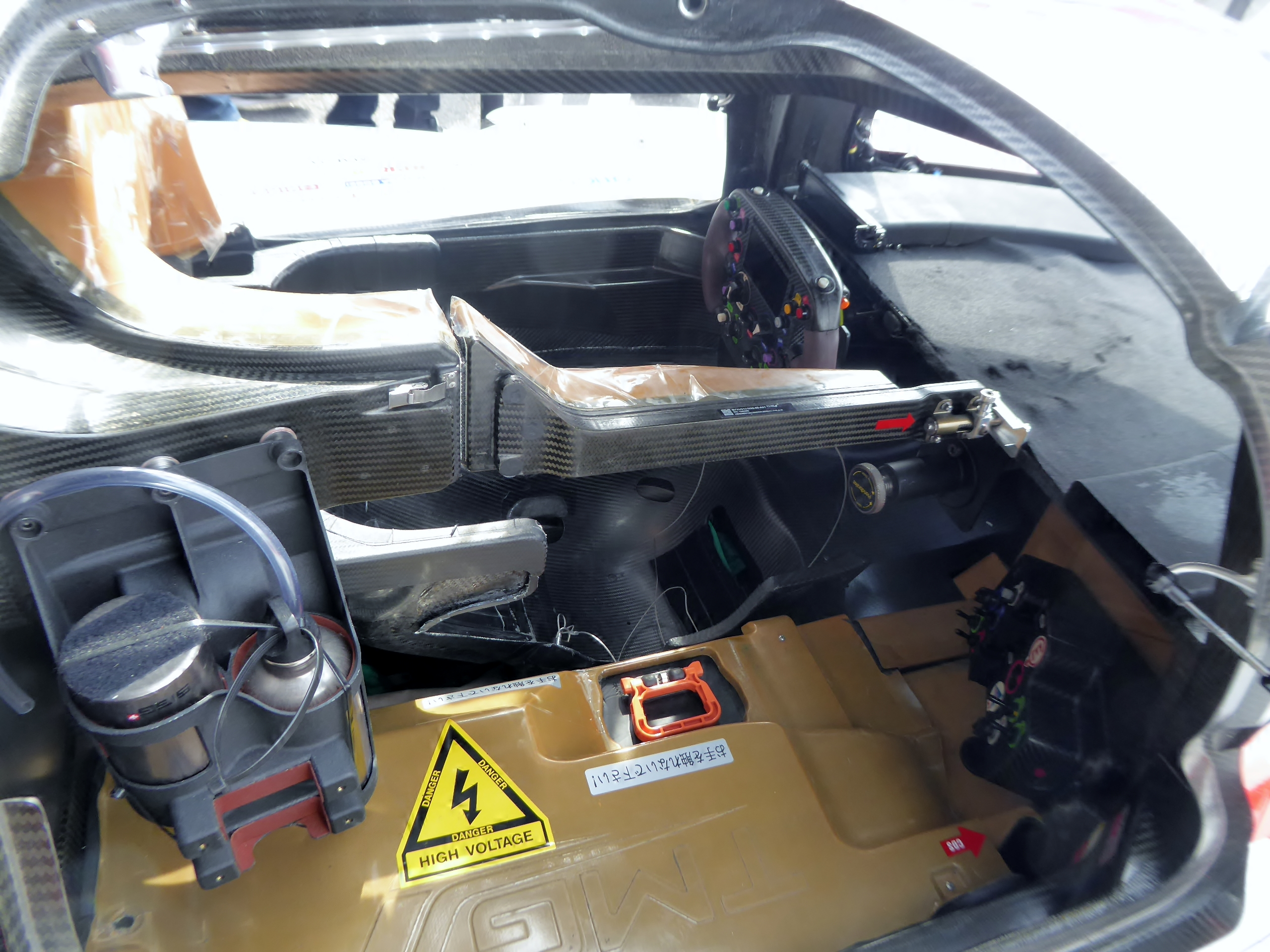 6号車TOYOTA TS050 HYBRIDの2017年仕様のインテリアを撮影。